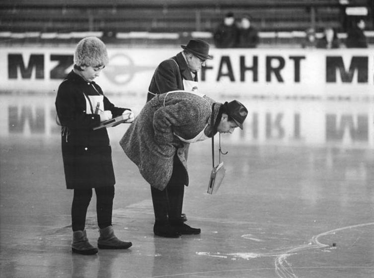 Eiskunstlaufen, Preisrichter Zentralbild Schaar 8.1.1967 Karl-Marx-Stadt: Deutsche Meisterschaften im Eiskunstlaufen. Preisrichter bei ihrer verantwortungsvollen Arbeit während der Pflichtläufe am 7.1.1967 im Karl-Marx-Städter Küchwald-Eisstadion.